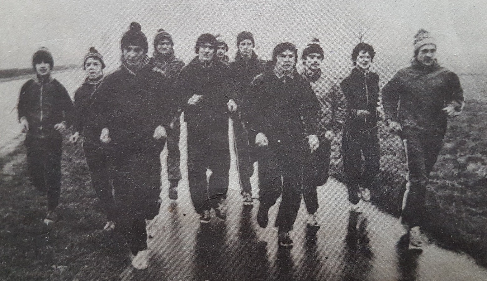 Lekkoatleci LKS Pomorza podczas treningu